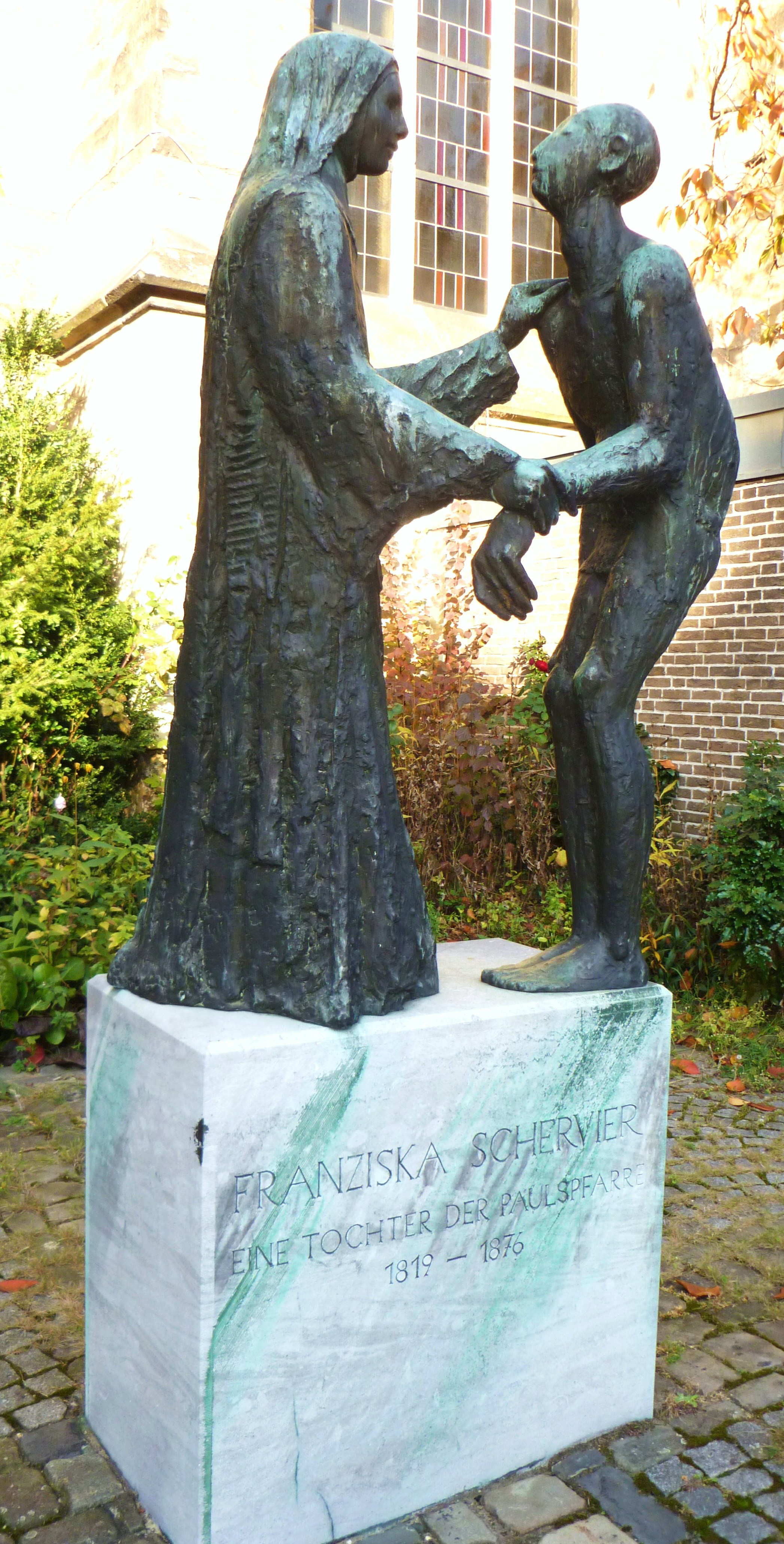 Denkmal für Franziska Schervier, Aachen, Hubert Löneke, 1976